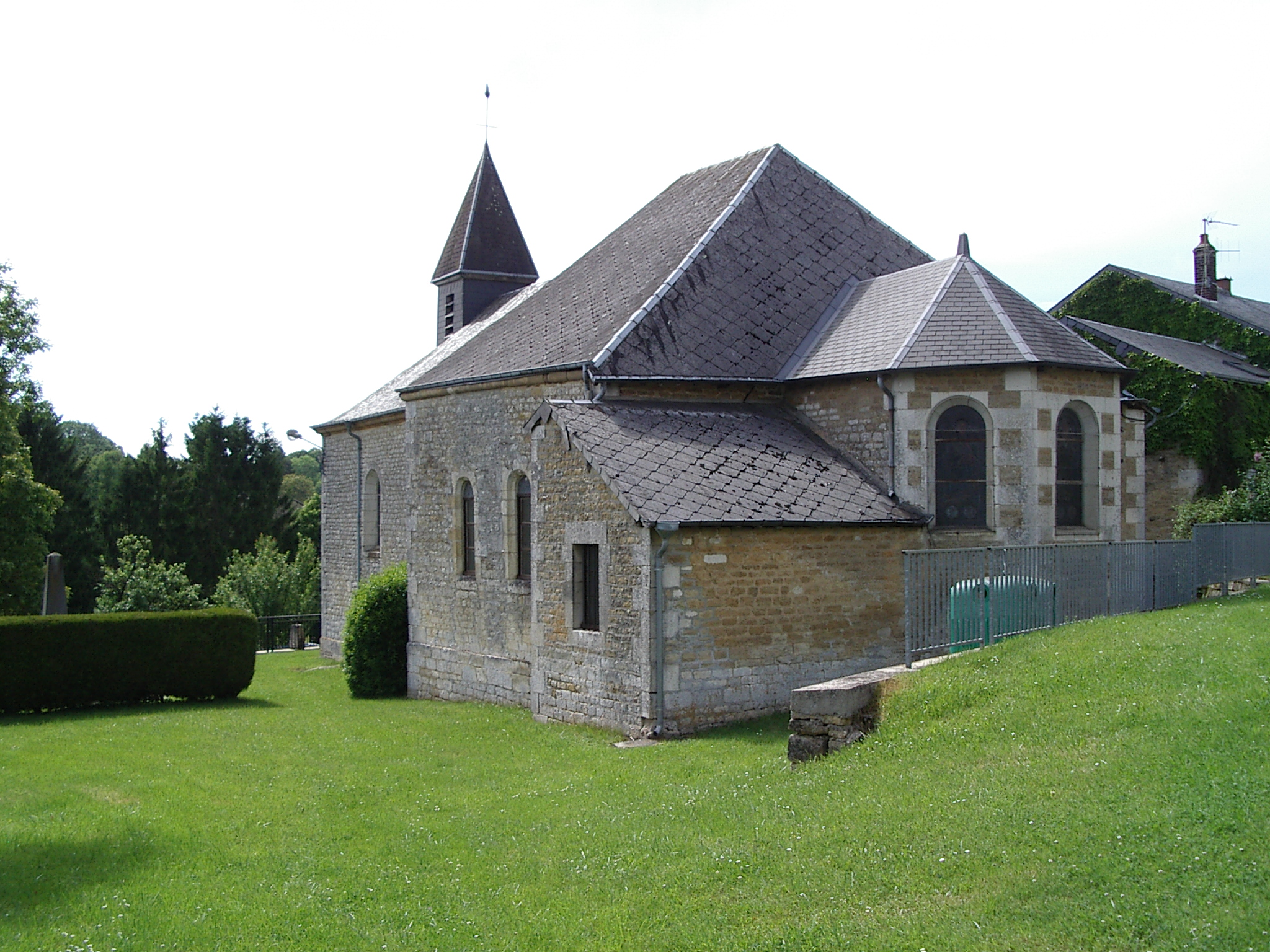 Barbaise est une commune française, située dans le département des Ardennes et la région Champagne-Ardenne-Eglise